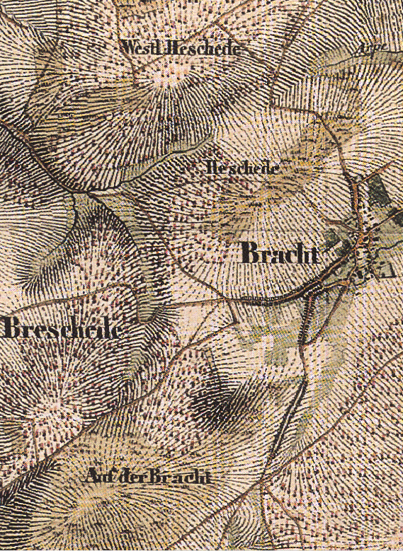 Ausschnitt Bracht, preußische Uraufnahme 1841, Historika25 Blatt Lennestadt